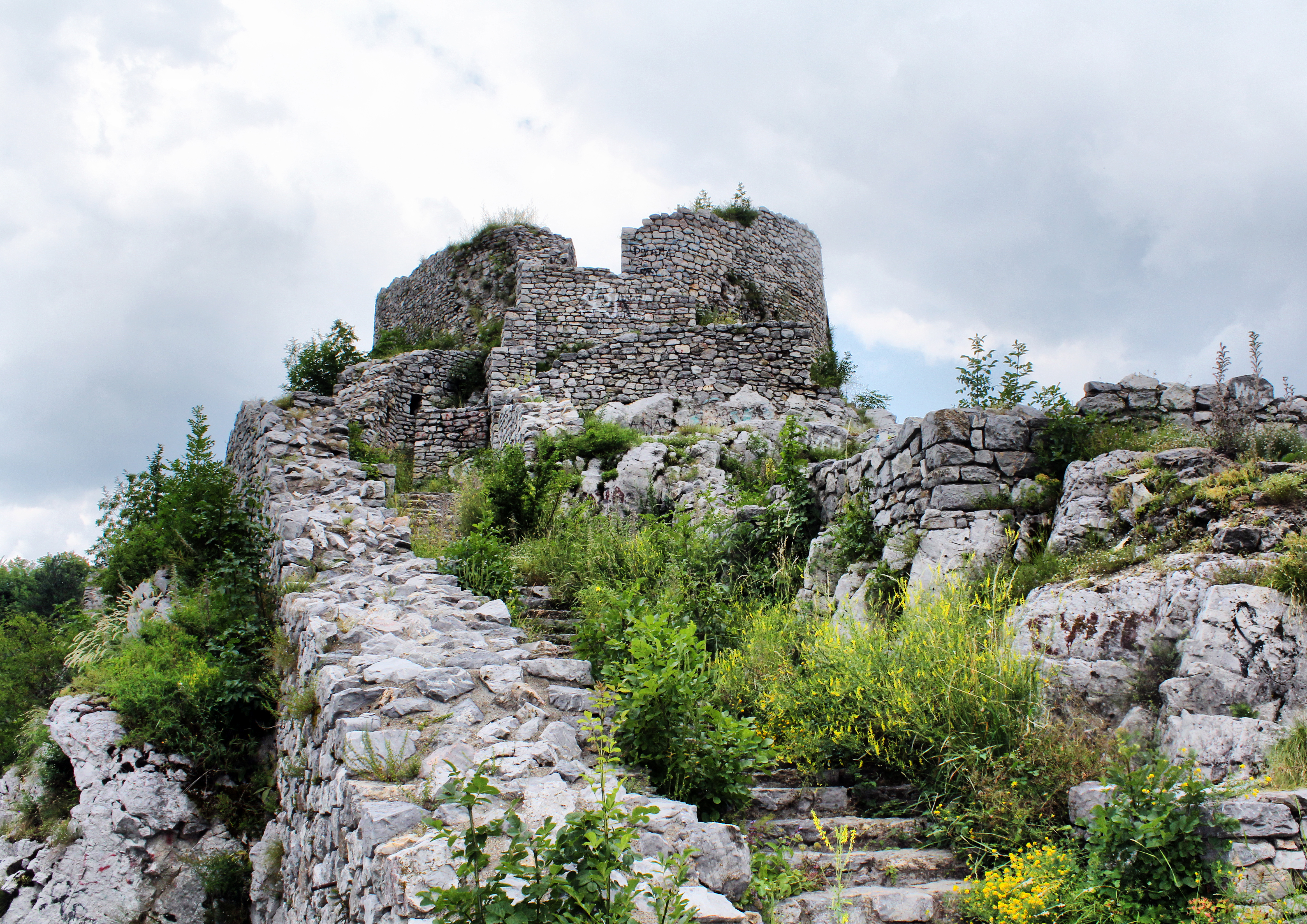 Užice, Serbia